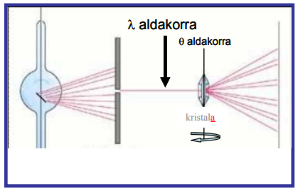 Bragg-en esperimentua